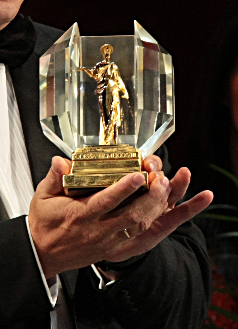 "Золотой Дюк": Главный приз Одесского международного кинофестиваля